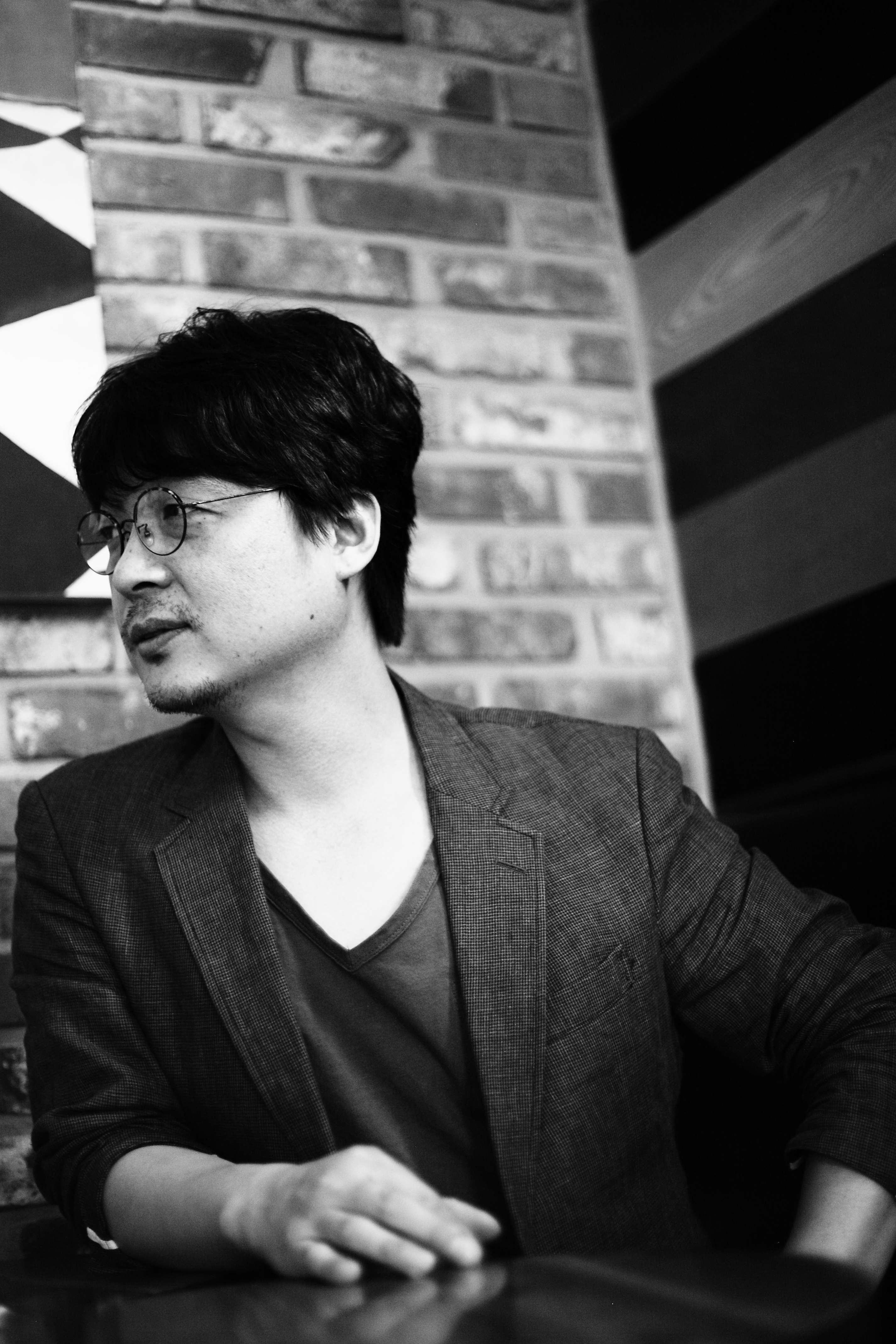 백가흠